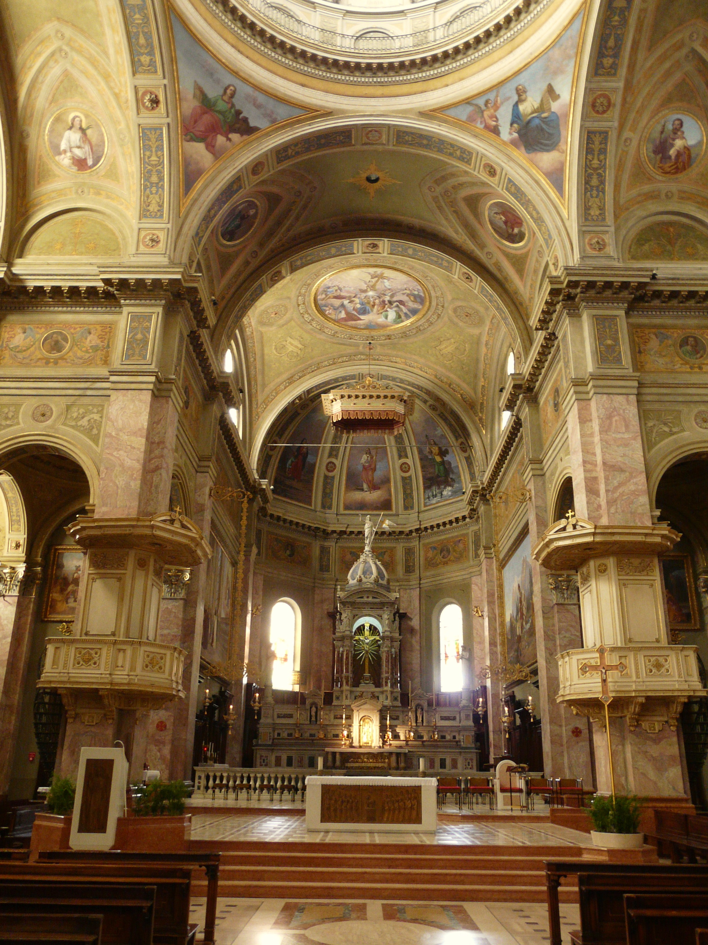 Altare maggiore della Chiesa di San Martino, Magenta, Lombardia, Italia